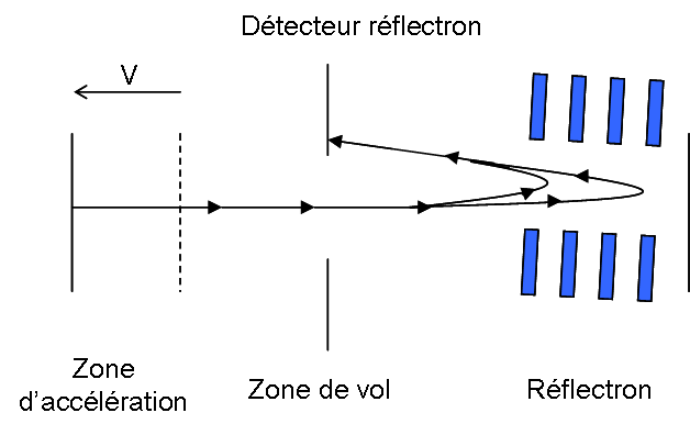 analyseur de spectrométrie de masse à temps de vol (time of flight TOF) schématisé, avec le trajet des ions, en mode réflectron